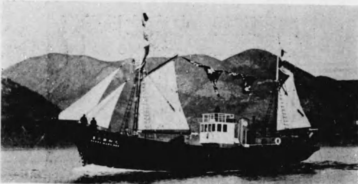 1930年建造の鮪釣漁船第二昭和丸、ディーゼルと帆走の両方を持った排水量108トンの機帆船漁船